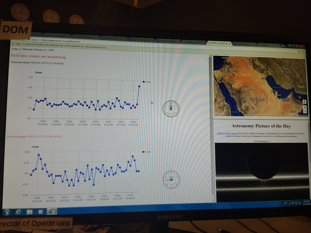 טלמטריה מניסוי שטף קרינה קוסמית שנערך במקביל במכתש רמון ובמדבר דרפור בעומאן. צילום מסך של הטלמטריה כפי שהיא נראתה בחדר הבקרה של משימת DMARS משימת המאדים האנלוגית הראשונה בישראל